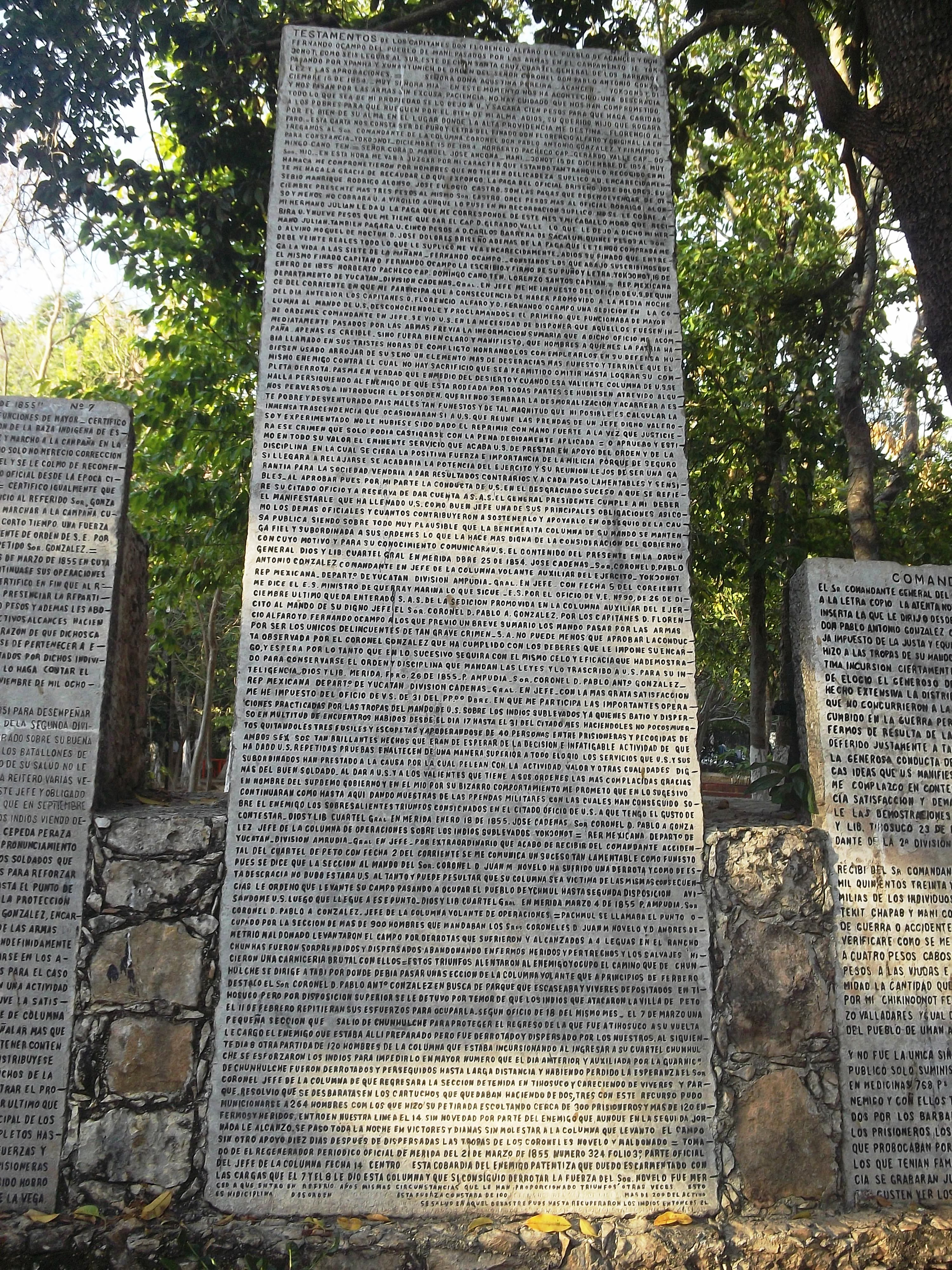 Parque Zoológico del Centenario en Mérida, Yucatán .